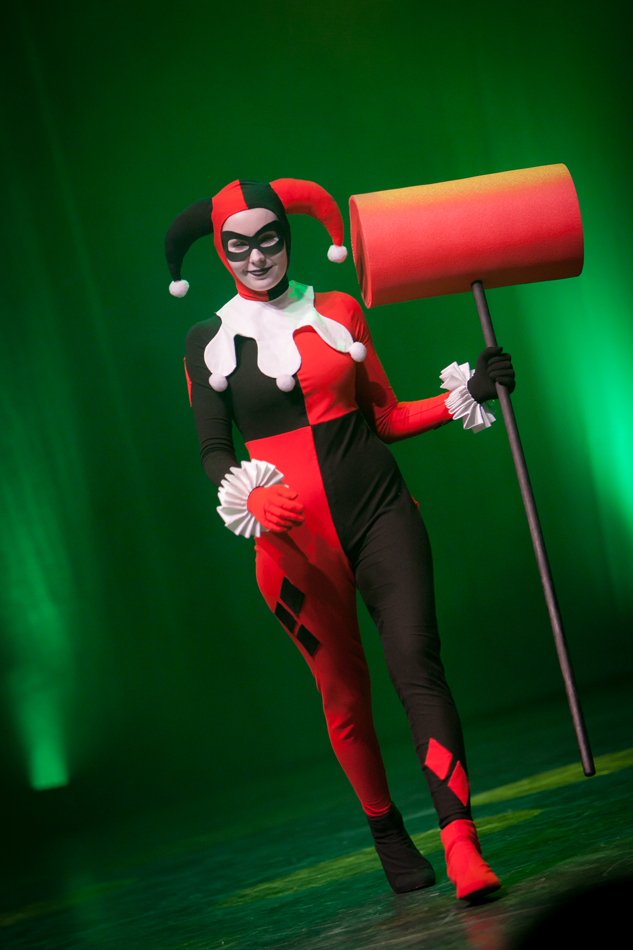 20140119142539IMG_6070